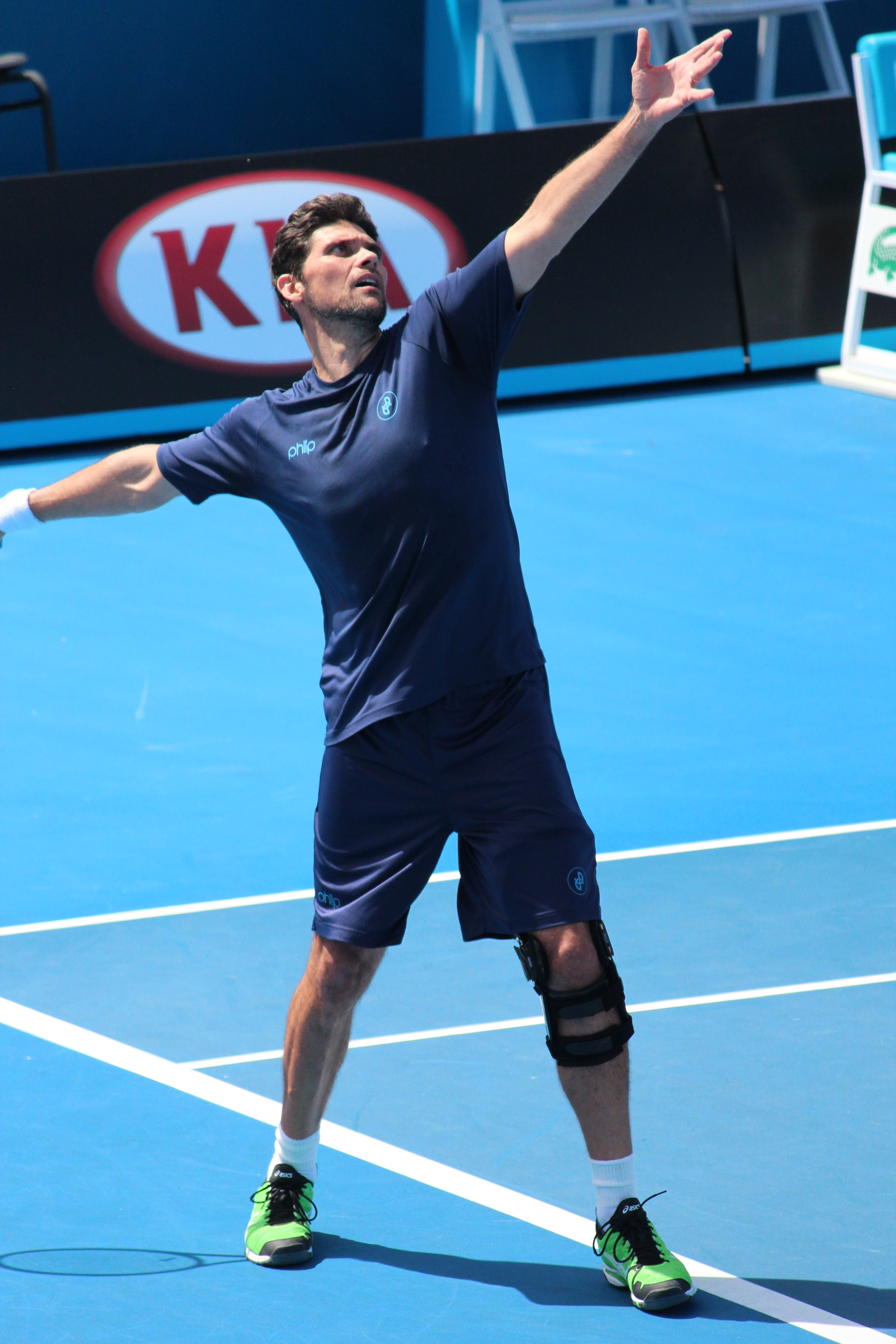 Mark Philippoussis